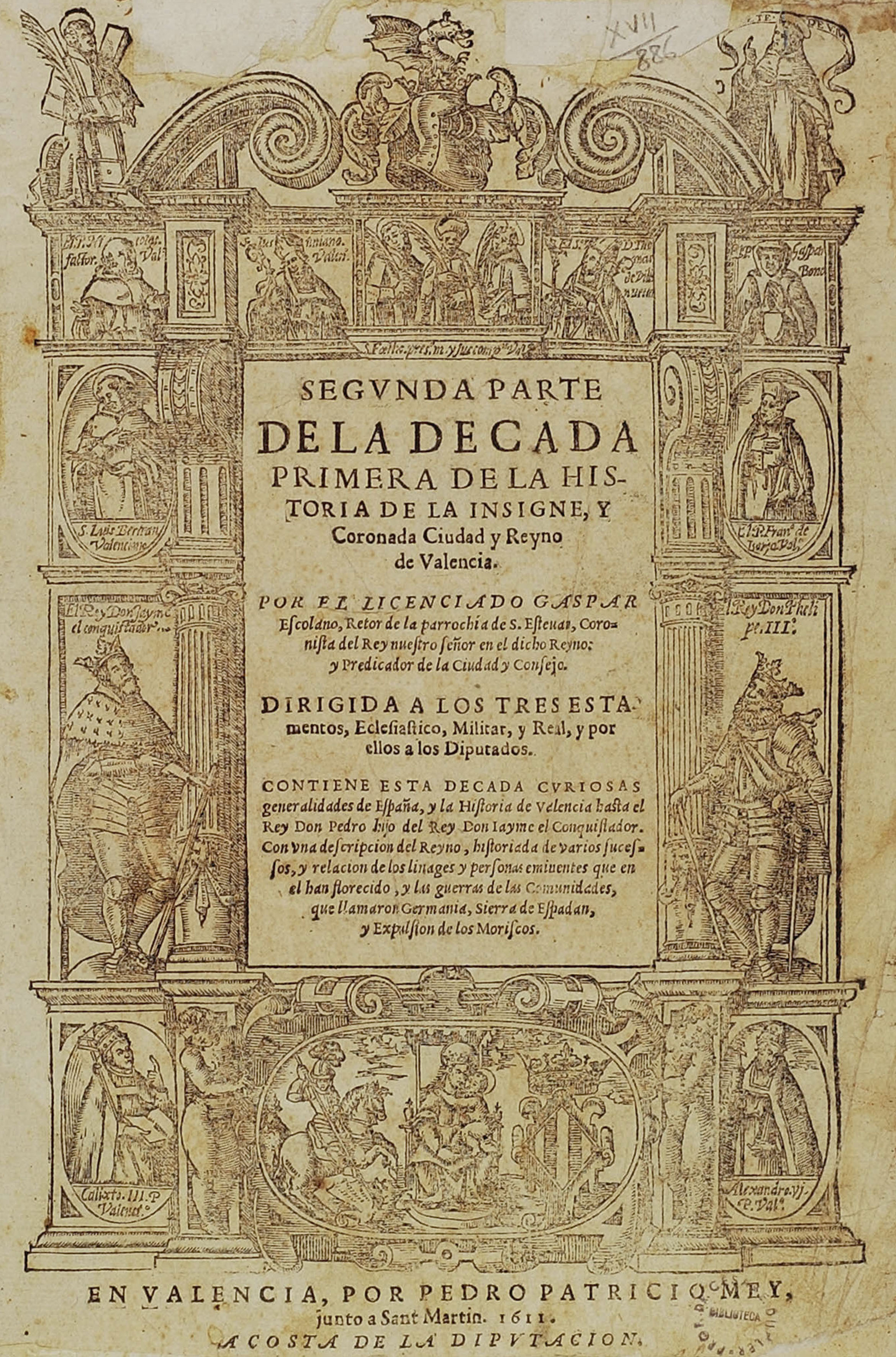 Portada de la "Segunda parte de la decada primera de la historia de la insigne y coronada ciudad y Reyno de Valencia" (1611) Gaspar Escolano. En Valencia : por Pedro Patricio Mey, junta a Sant Martí : a costa de la Diputacion, 1611.